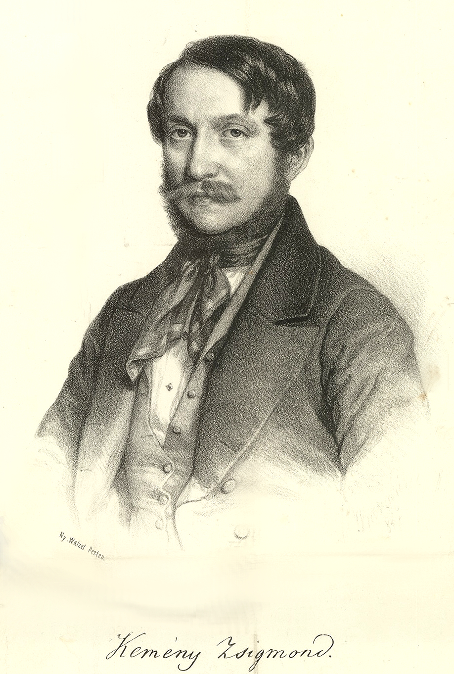 magyargyerőmonostori báró Kemény Zsigmond (Alvinc, 1814. június 12. – Pusztakamarás, 1875. december 22.) magyar író, publicista, politikus. A magyar romantikus regényirodalom Jókai Mór melletti legnagyobb alakja